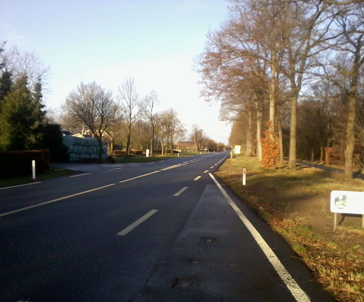 De N310 ten noorden van Harskamp t.h.v. het kruispunt met de Hoog Buurlooseweg.